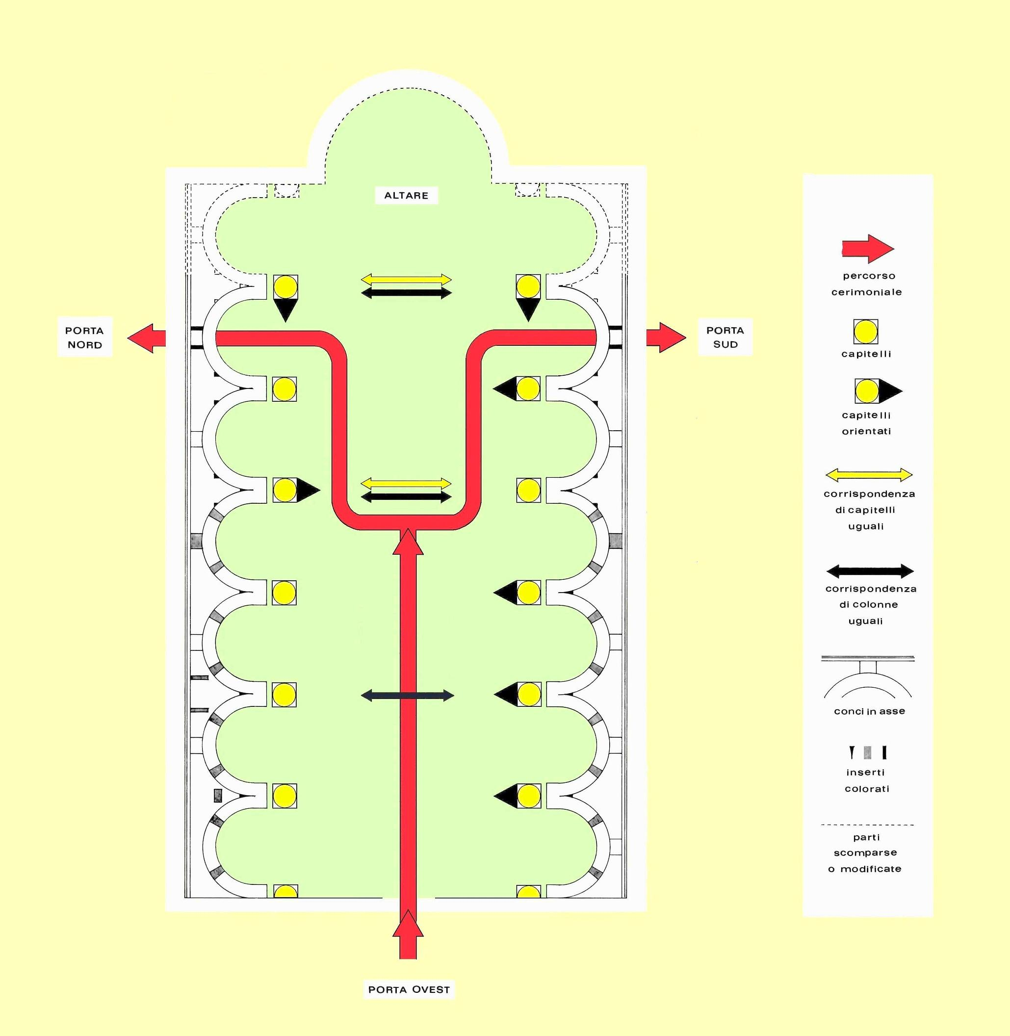 All'interno della chiesa, nella parte pertinente alla prima fase costruttiva, è ancora ben leggibile un percorso di natura liturgica che in origine la attraversava. I fedeli, entrando dalla porta principale ad ovest, venivano guidati verso l'altare dal ritmo binario delle colonne, alternativamente chiare e scure, e dai capitelli che - dove era evidenziato - rivolgevano sempre il loro lato principale verso la navata maggiore; all'altezza della quarta colonna è segnalata una sosta e un primo cambio di direzione: una coppia di colonne di granito rosso sormontate da capitelli uguali (a lira con corona di quercia) indicava il punto in cui iniziava l'area presbiteriale (che recintata da transenne doveva inoltrarsi nella navata), il percorso proseguiva così, dividendosi a destra e a sinistra, avvicinandosi all'altare collocato davanti l'abside. Un'altra coppia di sostegni uguali, questa volta pilastri, e di capitelli uguali segnalava poi alla fine della navata un ulteriore cambio di direzione: i capitelli - significativamente rivolti ora verso l'ingresso - indicavano l'inaccessibiltà dell'area più sacra della chiesa e l'uscita verso le porte laterali. Va evidenziato come anche il colore delle arcate (nel disegno rappresentate ribaltate sul piano) cambia coerentemente con colonne e capitelli, sottolineando l'area riservata ai fedeli (quattro arcate bicrome) e quella riservata al culto (tre arcate bianche), di cui la centrale, che inquadra le uscite laterali, è distinta da una coppia di listelli verticali.